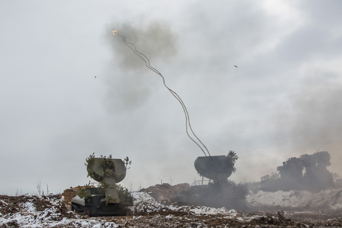 В Мулино сапёры-штурмовики 1-й гвардейской моторизованной инженерной бригады отработали действия по проделыванию проходов в минных полях.